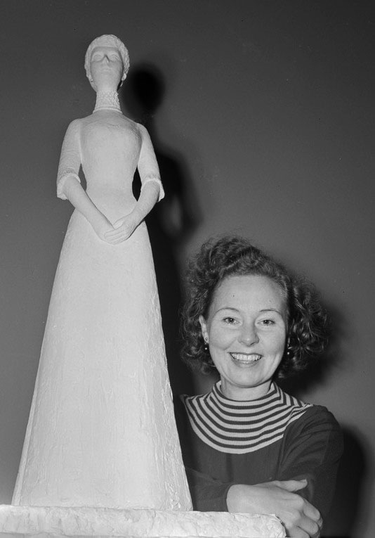 portrett, kvinne, billedhugger, skulptur. Rigmor Dahl Delphin (1908-1993) var ansatt som fotograf i ukebladet Alle Kvinner. Hennes negativarkiv ble i 2005 overført Oslo Bymuseum fra Gyldendal Norsk Forlag som var utgiver av bladet.